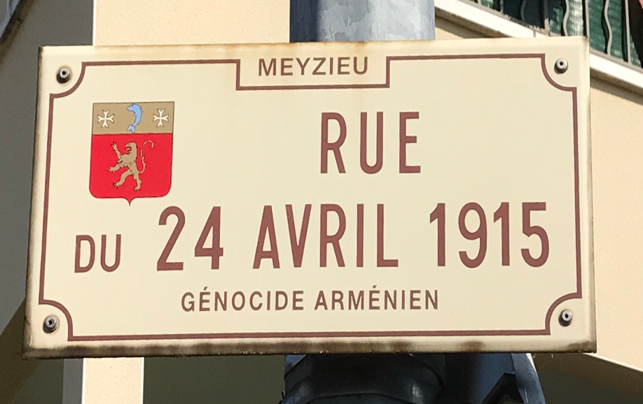 Rue du 24-avril-1915 (Meyzieu).